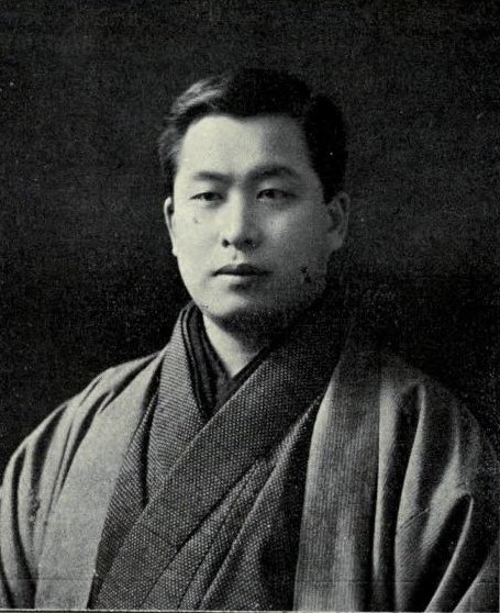 中村豊次郎 美唄市開拓者。三重県出身。東京専門学校 (旧制)で学んだのち、横浜の私塾であるビクトリアパブリックスクールでも学んだ。渡米してアメリカの農業を視察し、帰国後藩命で北海道美唄へ入植。